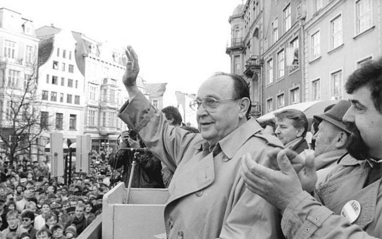 ADN-ZB Sindermann 3.3.90 frs Rostock: BRD-Aussenminister Hans-Dietrich Genscher sprach auf dem Rostocker Universitätsplatz vor tausenden Einwohner. Der FDP-Politiker ist Gast des Bundes Freier Demokraten. Zu dem sich die LDP, die FDP und die Deutsche Forumpartei (DFP) zusammengeschlossen haben.